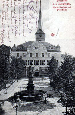 Bensheim auf einer Postkarte aus dem Jahr 1900